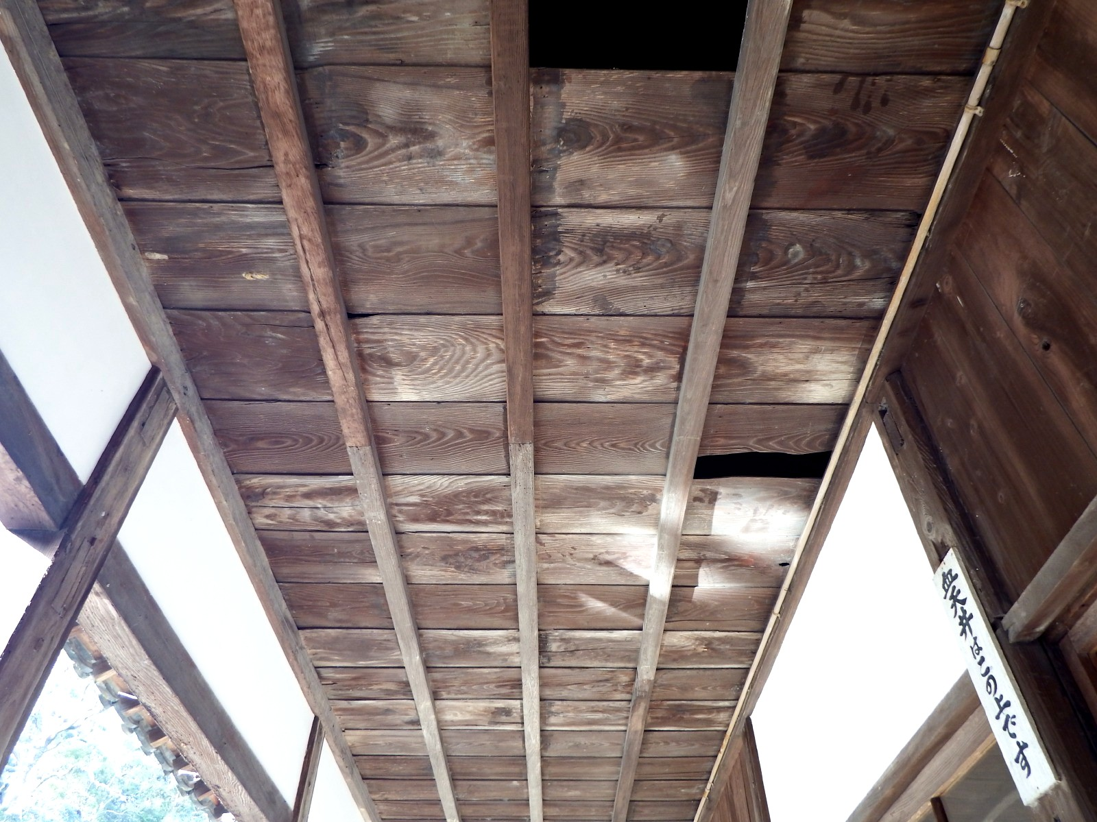 丈六寺の血天井